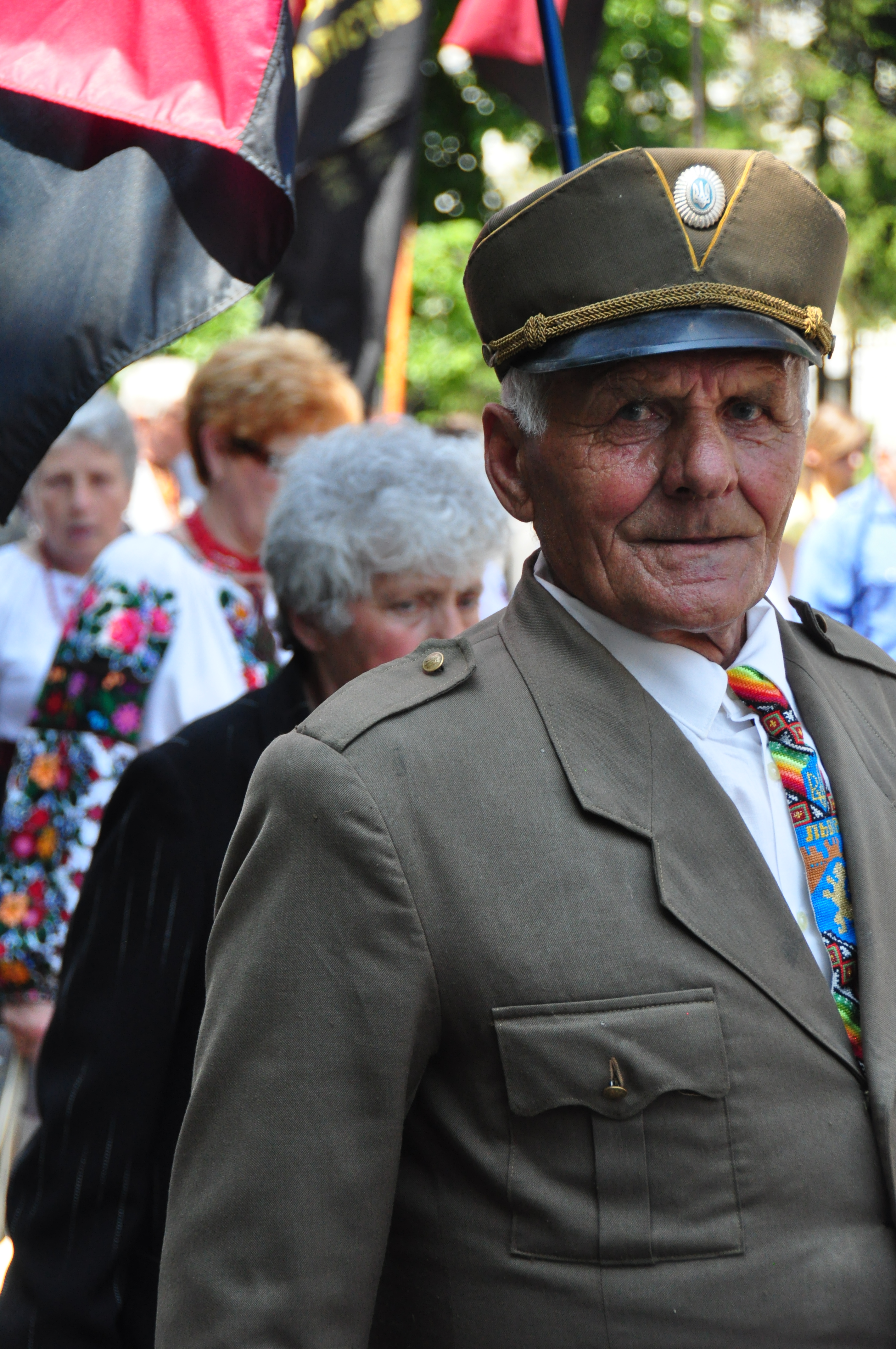 Святкування Дня Героїв у Львові 22 травня 2011 р. Ветеран УПА в колоні демонстрантів.